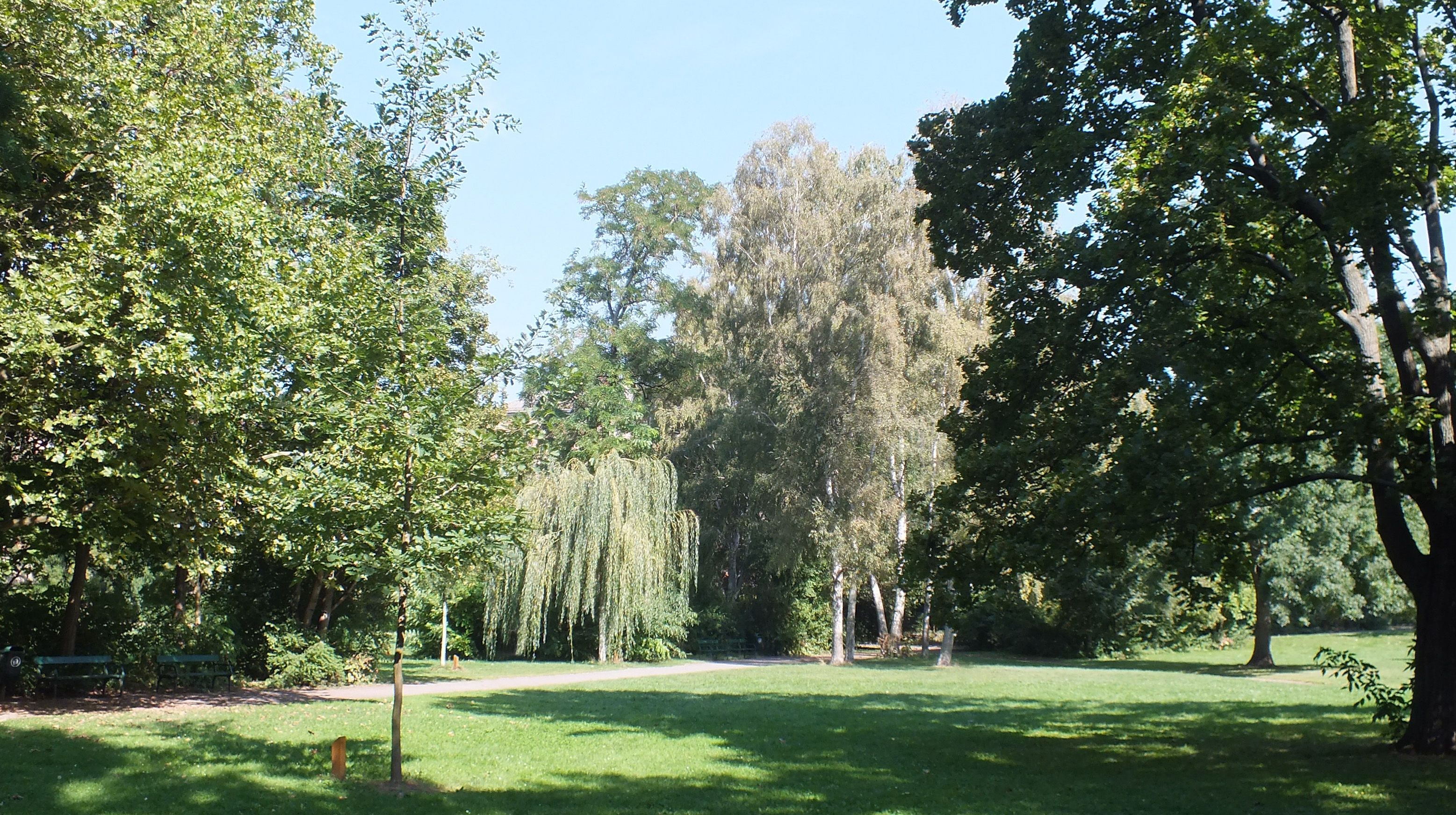 Im Elsapark Leipzig